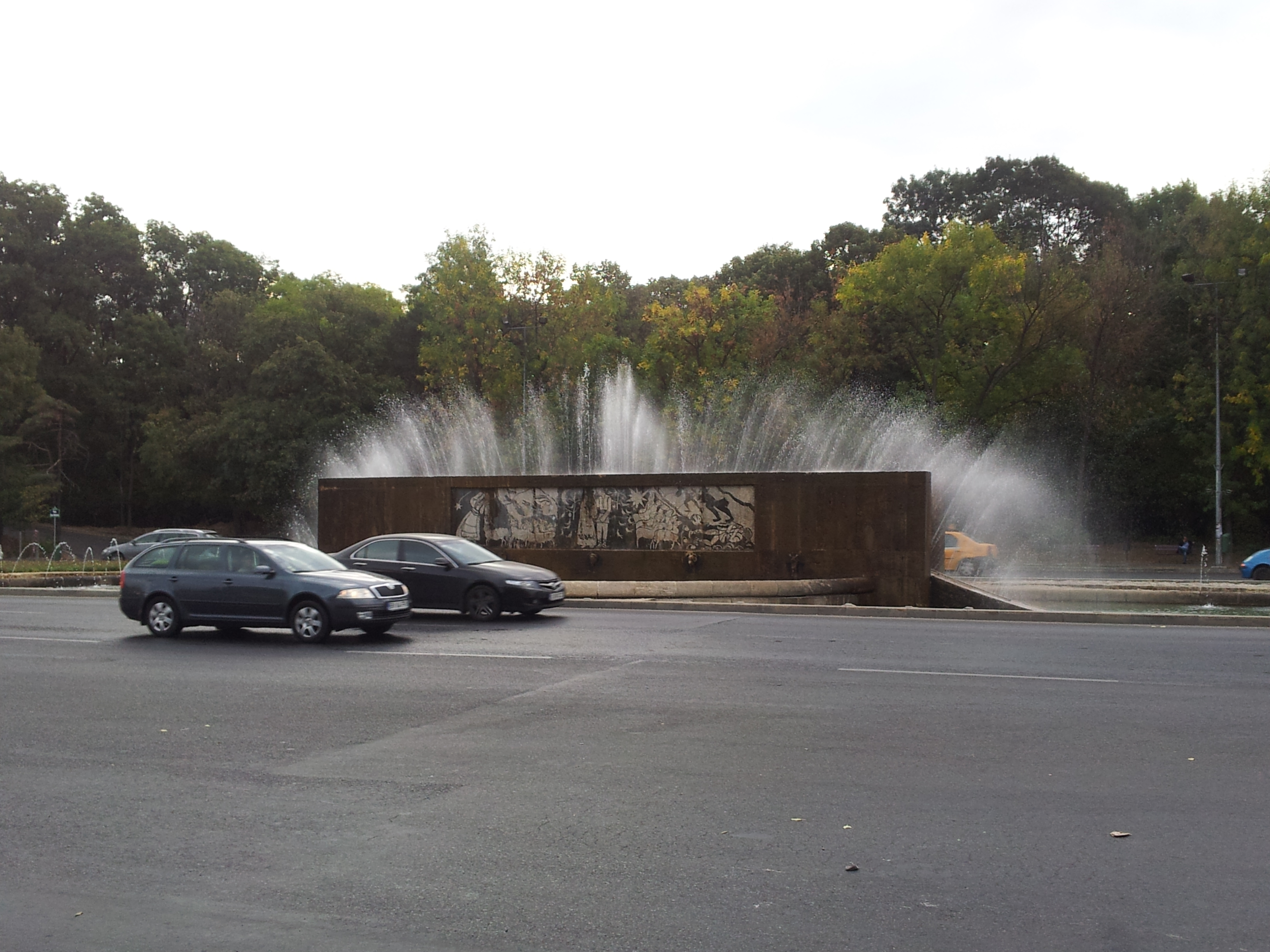 Fantana Miorita